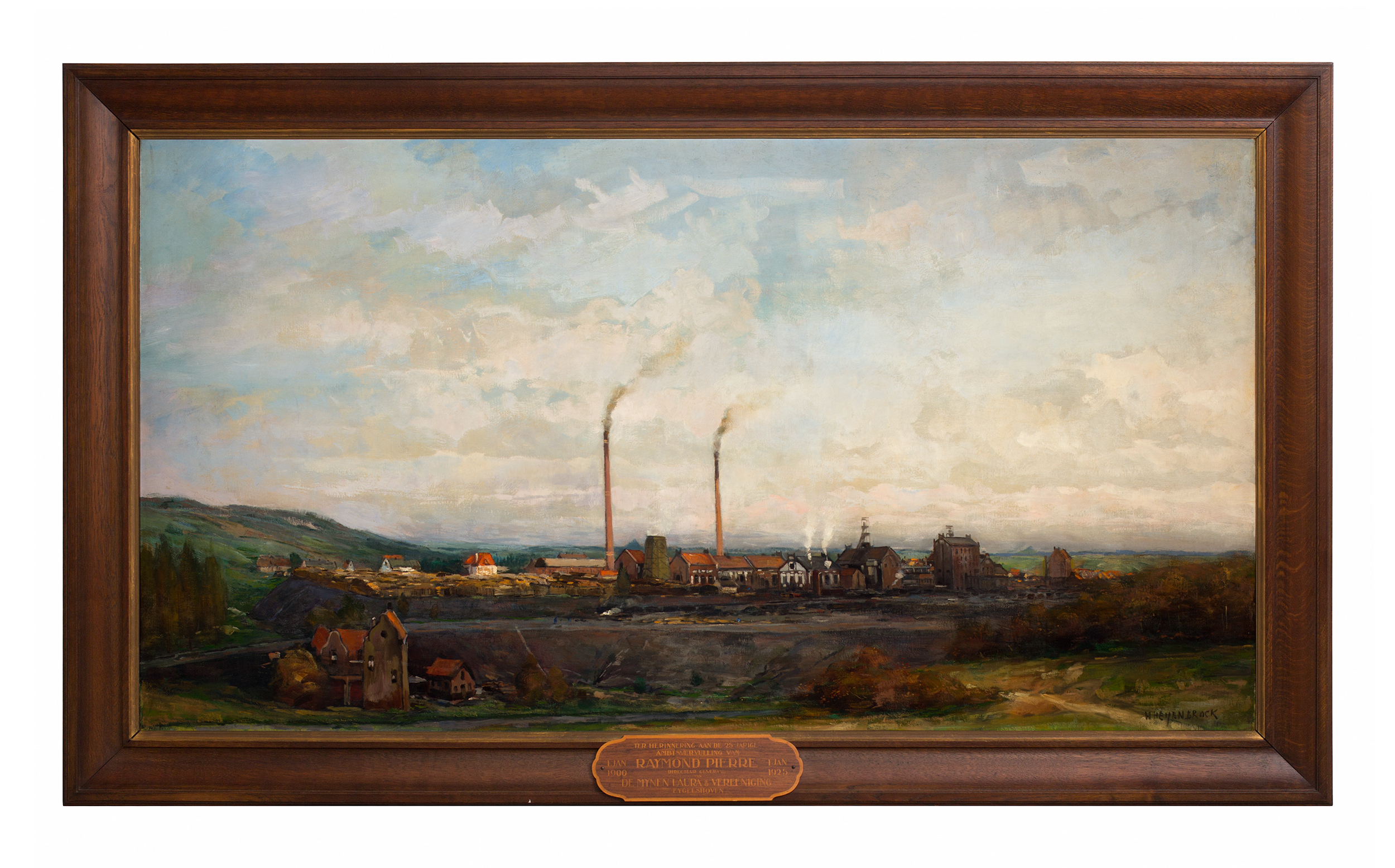 Panorama van de mijn Laura & Vereeniging. Lange smalle rokende torens. Daar tussen koeltoren. Rechts twee mijnliften. Op de voorgrond links een hoeve/kasteeltje met toren. op achtergrond links een hoeven en een heuvel.